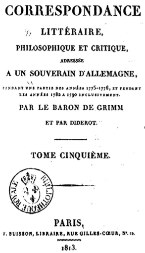 Page de titre Correspondance littéraire, philosophique et critique, 1814